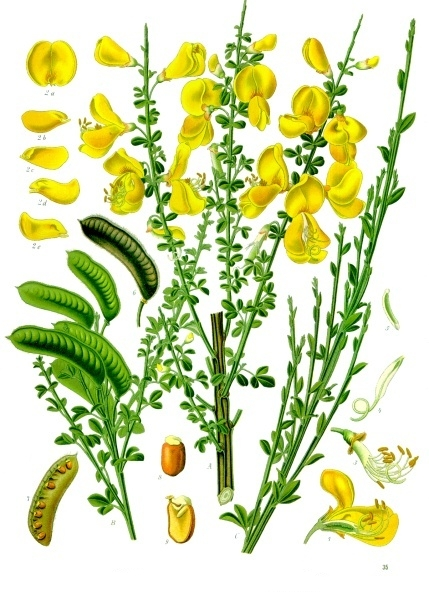 Besenginster. A blühender Zweig; B Fruchtzweig; C junger diesjähriger Trieb. 1 Blüte im Längsschnitt; 2 ein Blatt des Kiels; 3 Staubblätter und Griffel; 4 Stempel; 5 Narbe; 6 reife Frucht; 7 dieselbe geöffnet; 8 Samen; 9 Längsschnitt des Samens; 10 Querschnitt des Stengels. — A, B, C, 6, 7, 10 natürliche Grösse. 1—5, 8, 9 vergrössert.